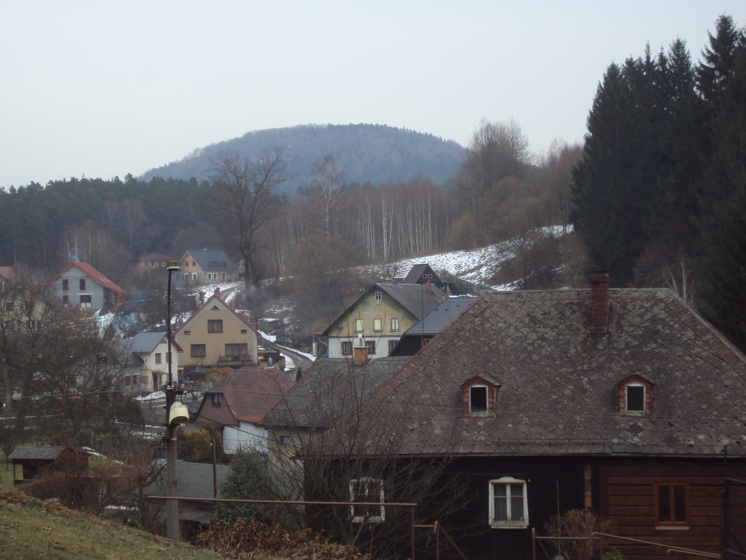 Kopec nad Sloupem v Čechách